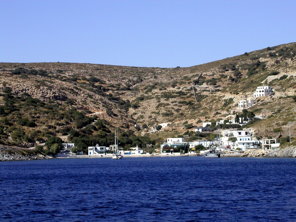 Das Dorf Megálo Chorió auf Agathonisi, fotografiert am 14.9.2004